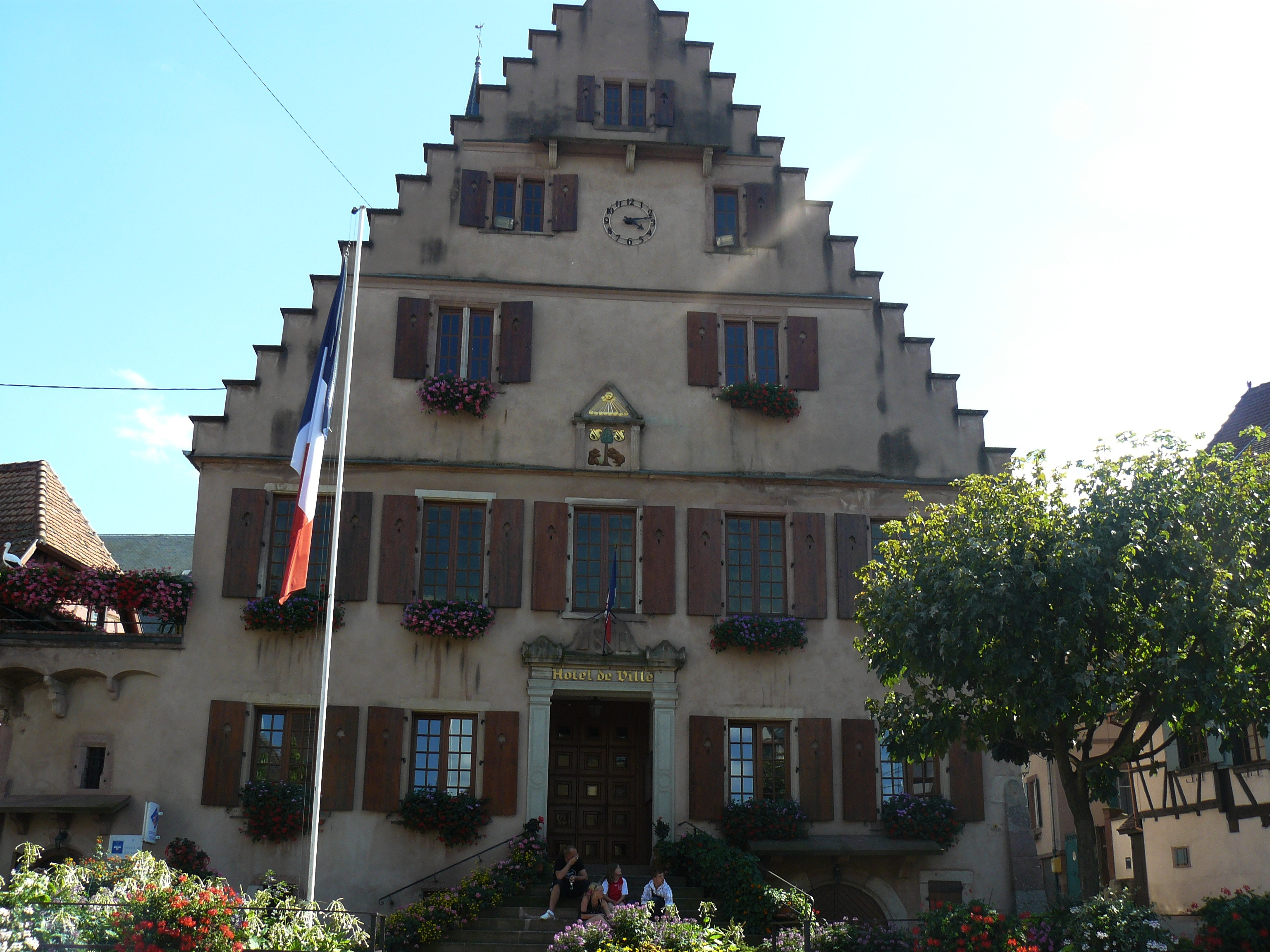 Hôtel de ville de Dambach-la-Ville